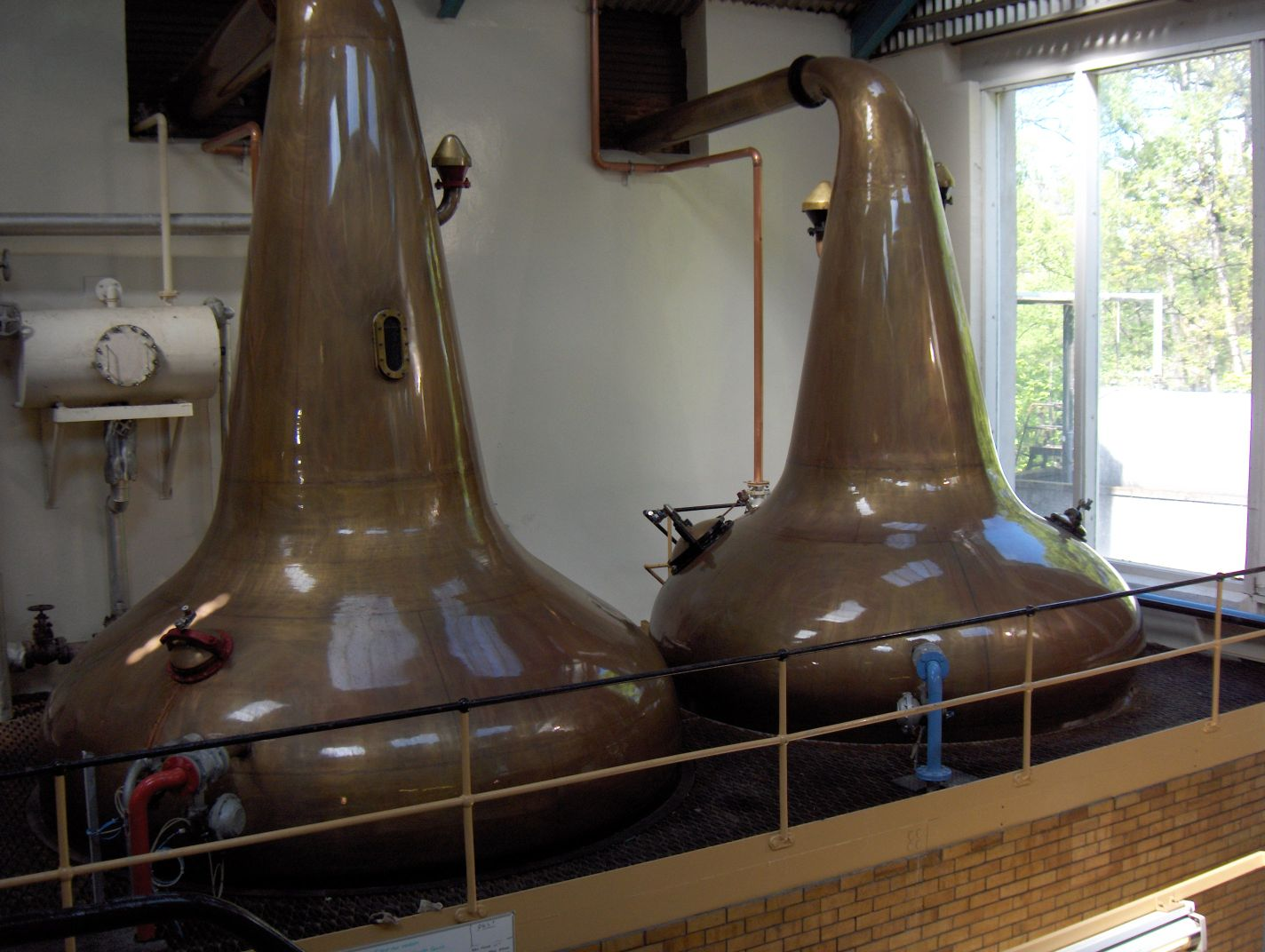 Bildbeschreibung: Wash still and spirit still at Aberlour Quelle: selbst fotografiert Datum: 2006-05-25